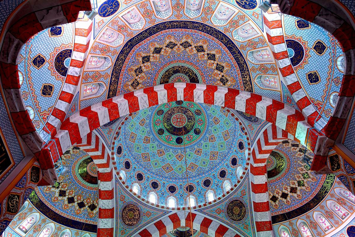 Interior Great mosque in Erbil, Iraqi Kurdistan